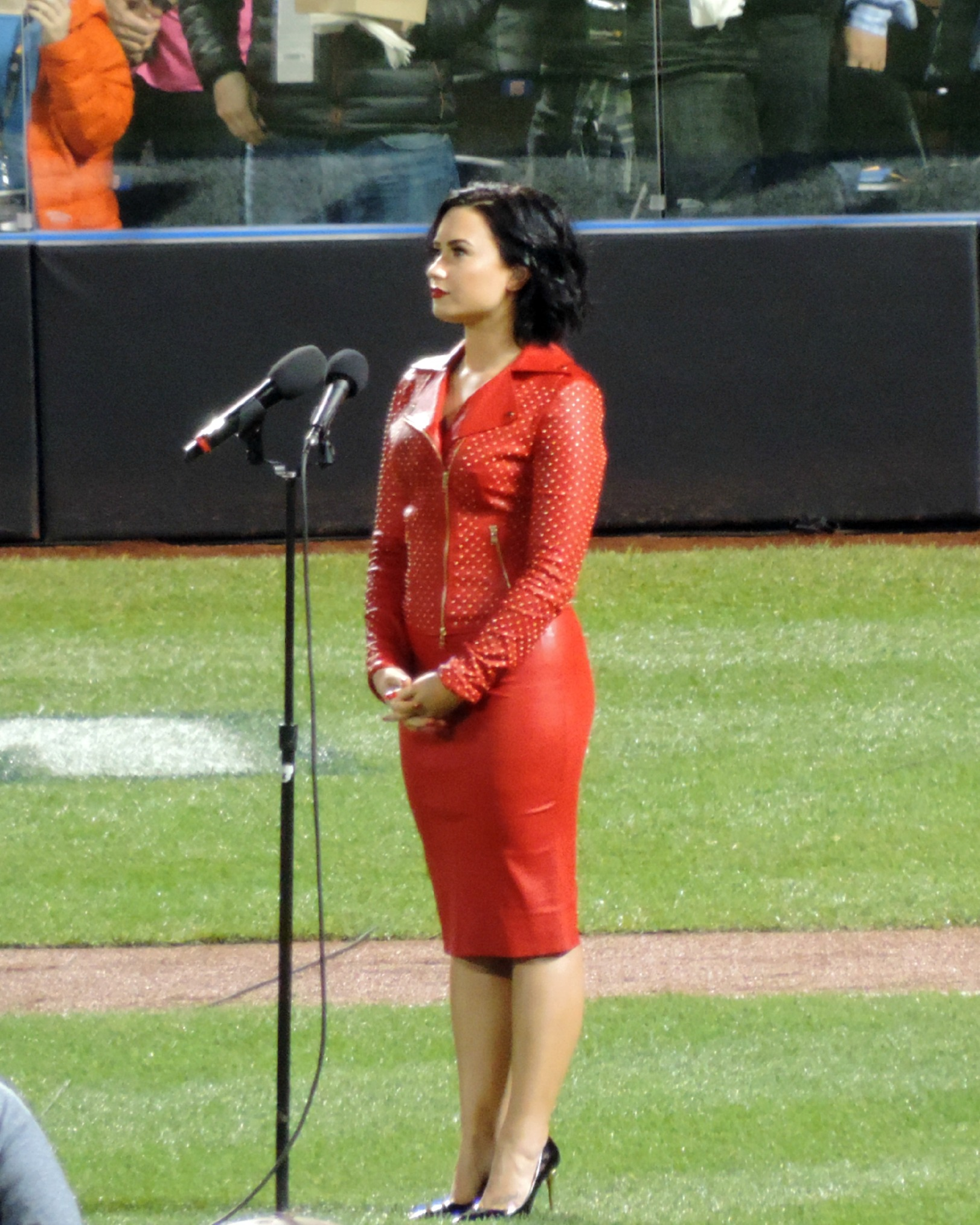 Demi Lovato